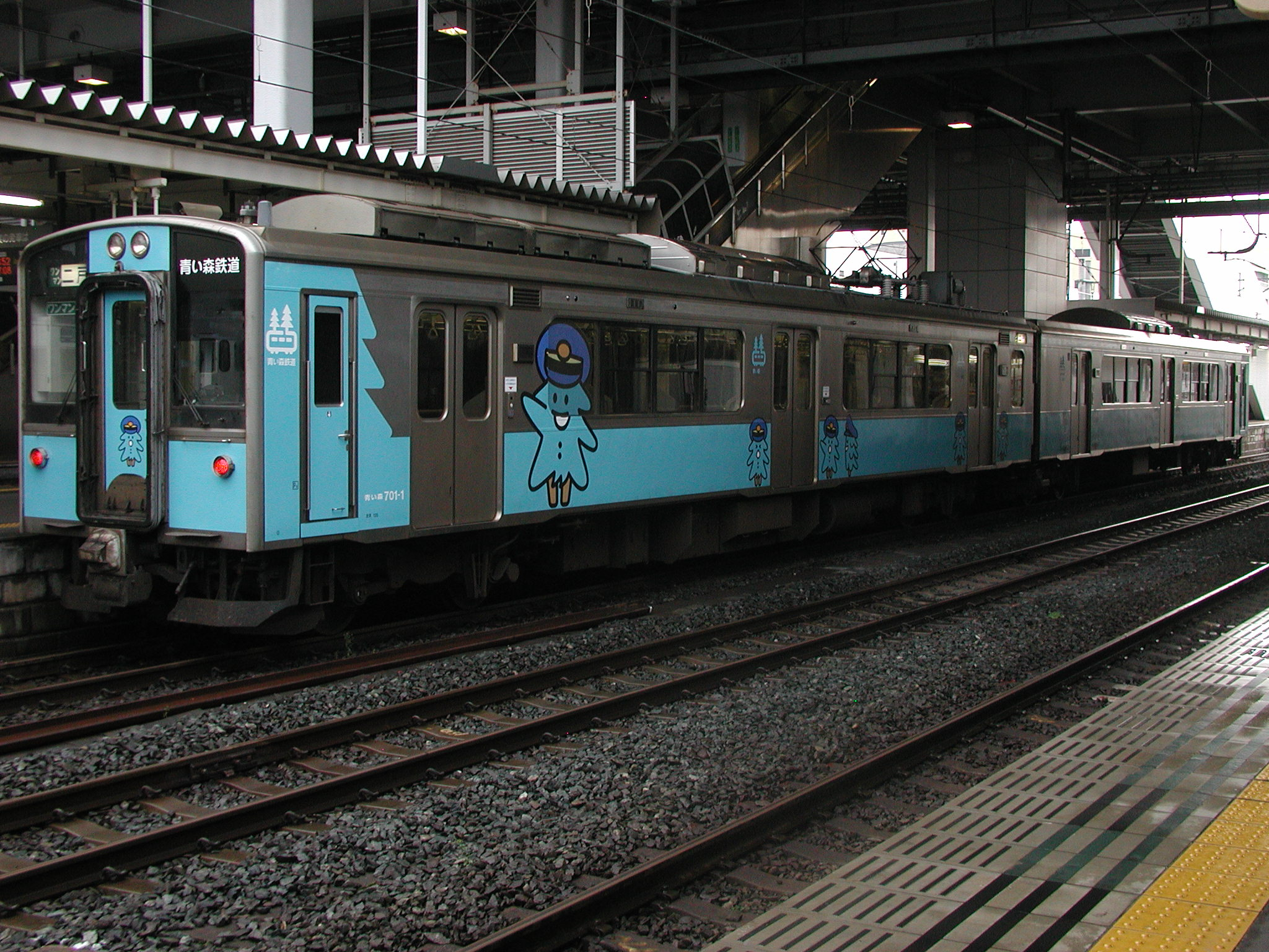 青い森鉄道 青い森701系（八戸暫定開業時の東日本旅客鉄道(JR東日本)からの譲受車） - 同社キャラクター「モーリー」をあしらった新塗装